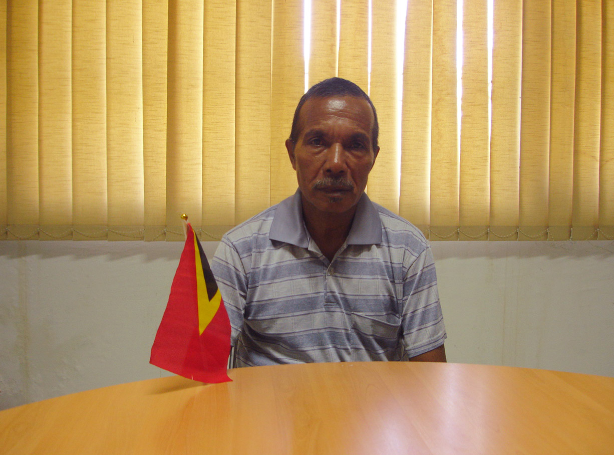 Anacleto Doutel Sarmento, Administrator des Subdistrikts Uato-Lari